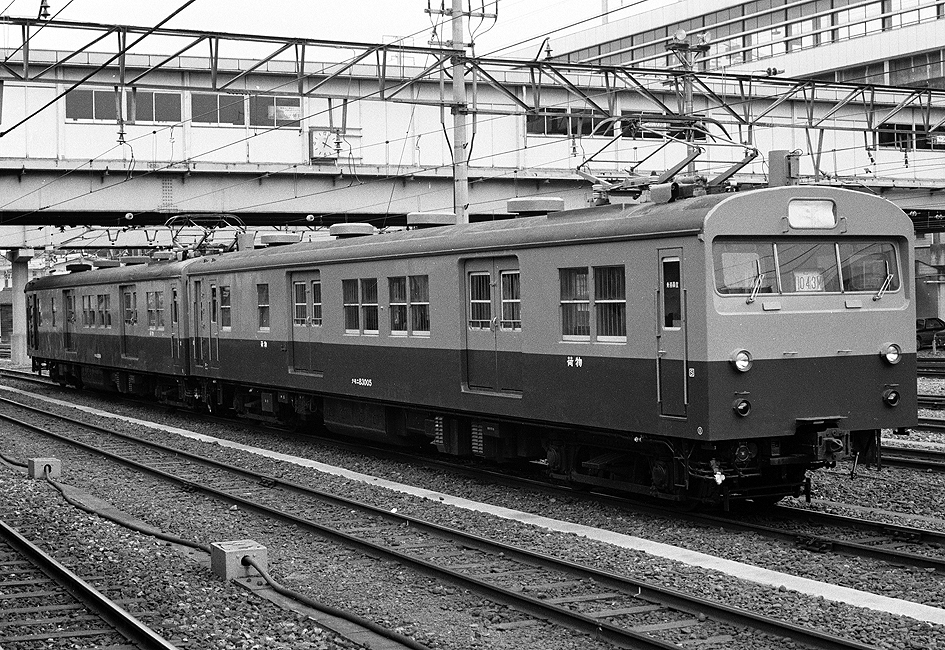 国鉄クモニ83005+クモニ83016